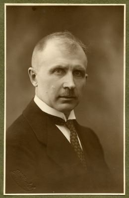 Karl Schlossmann